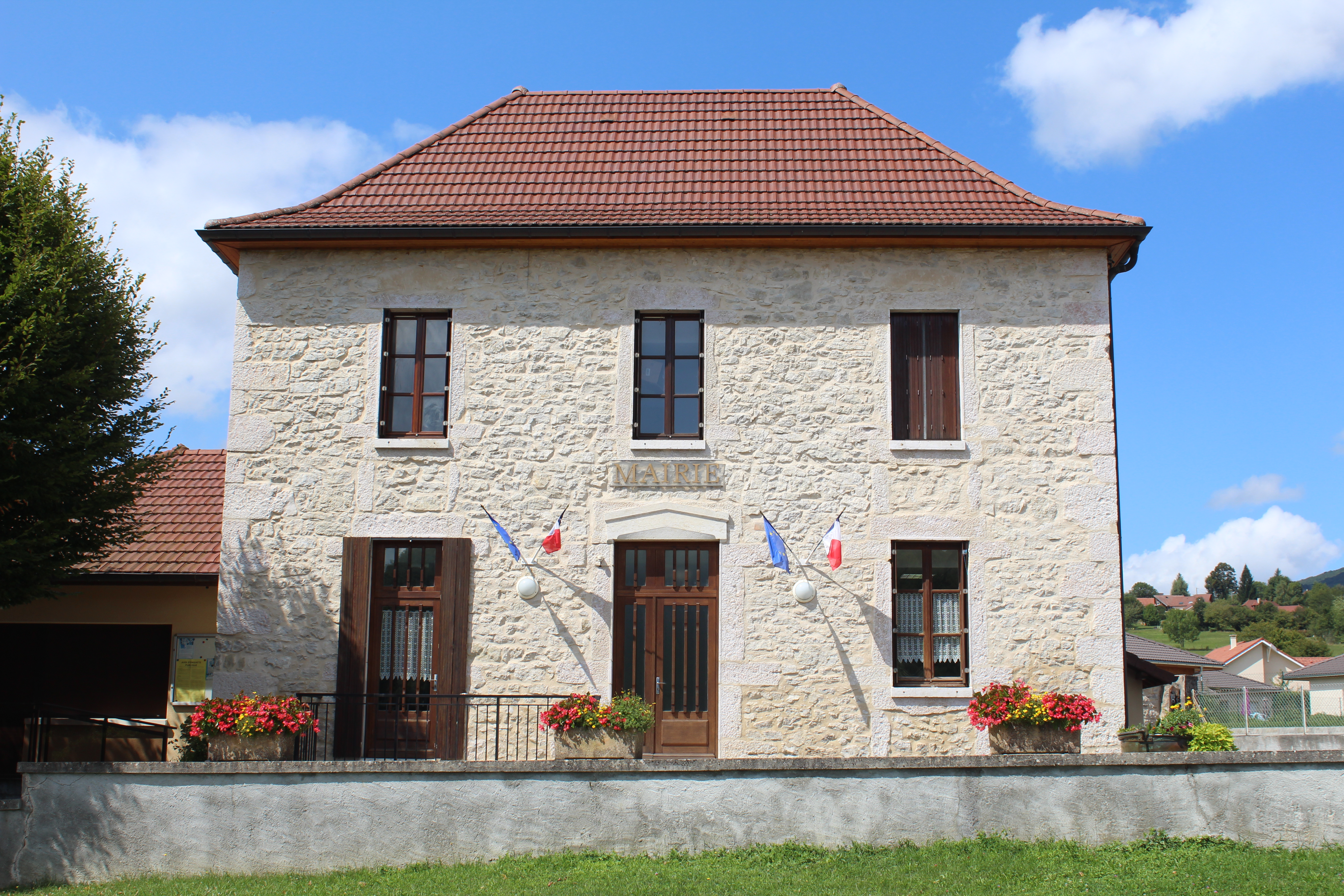 Mairie de Cuzieu.